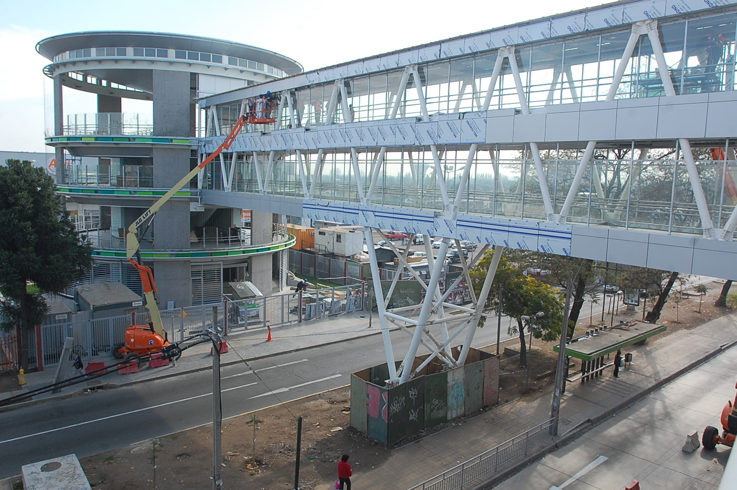 Vista de la estación Las Parcelas de la Línea 5 del Metro de Santiago